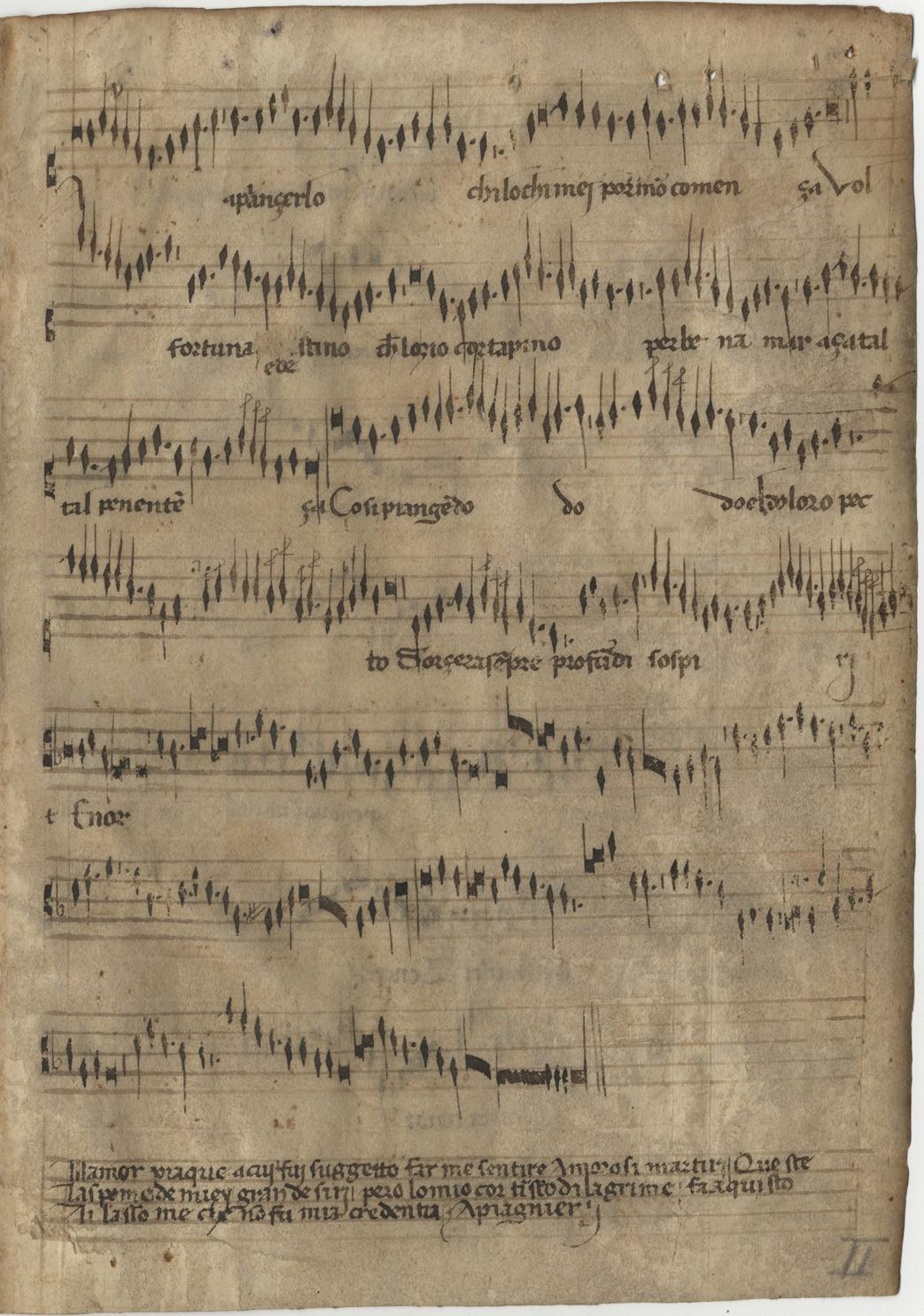 Pistoia, Archivium Capituli Pistoriensis B.3.5